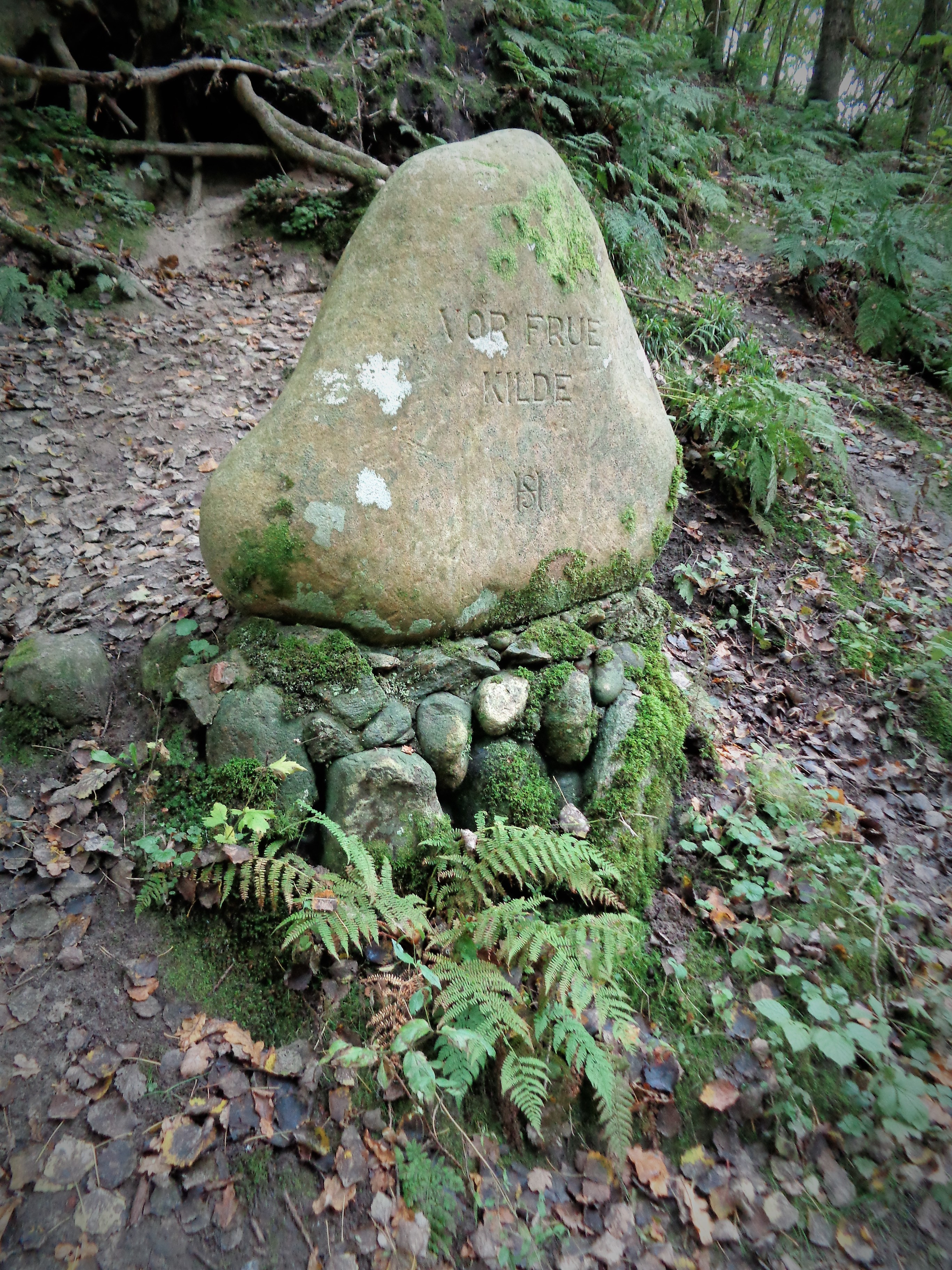 Die Quelle Vor Frue Kilde im dänischen Fosdal.